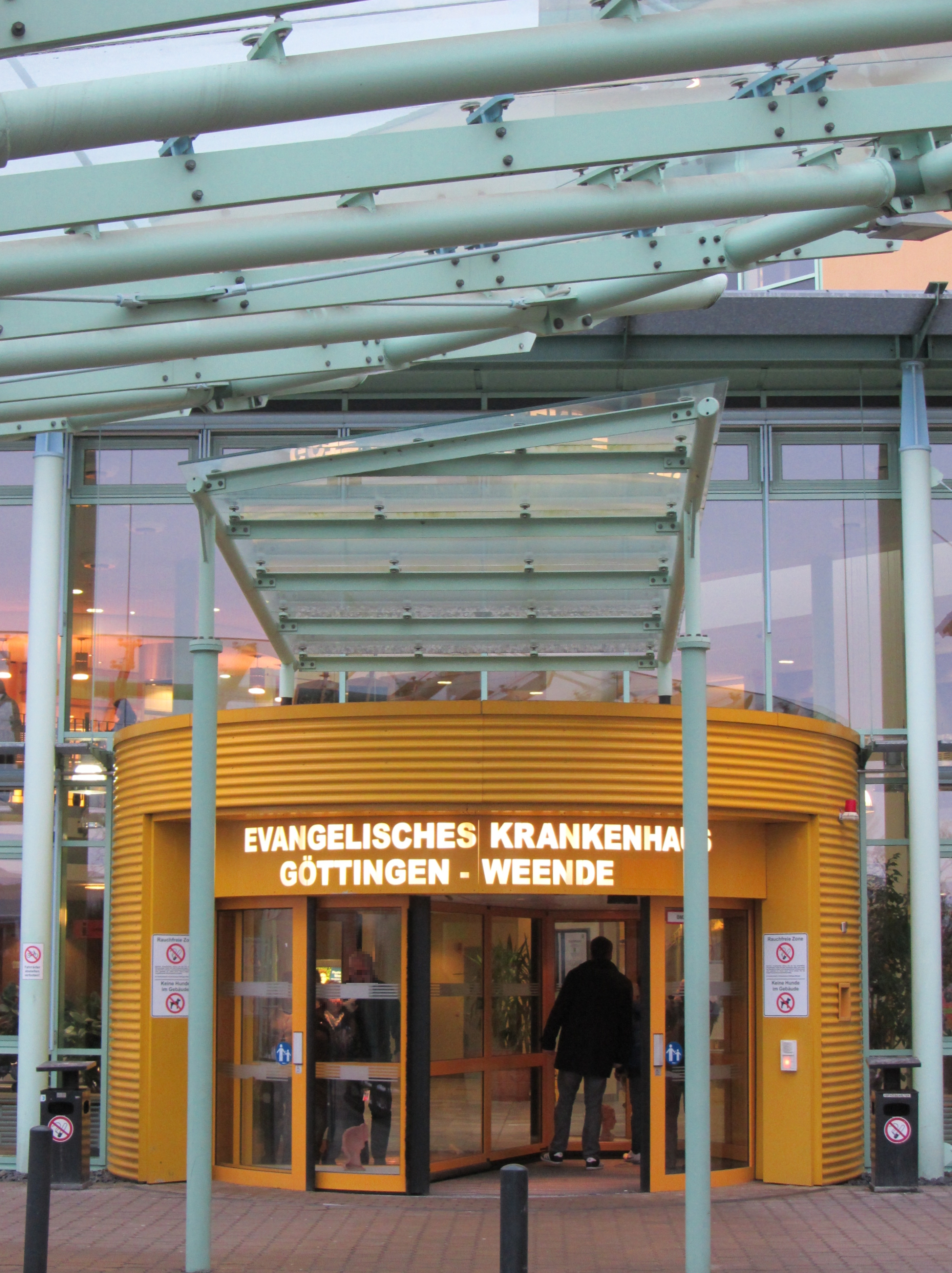 Evangelisches Krankenhaus Göttingen-Weende, Haupteingang